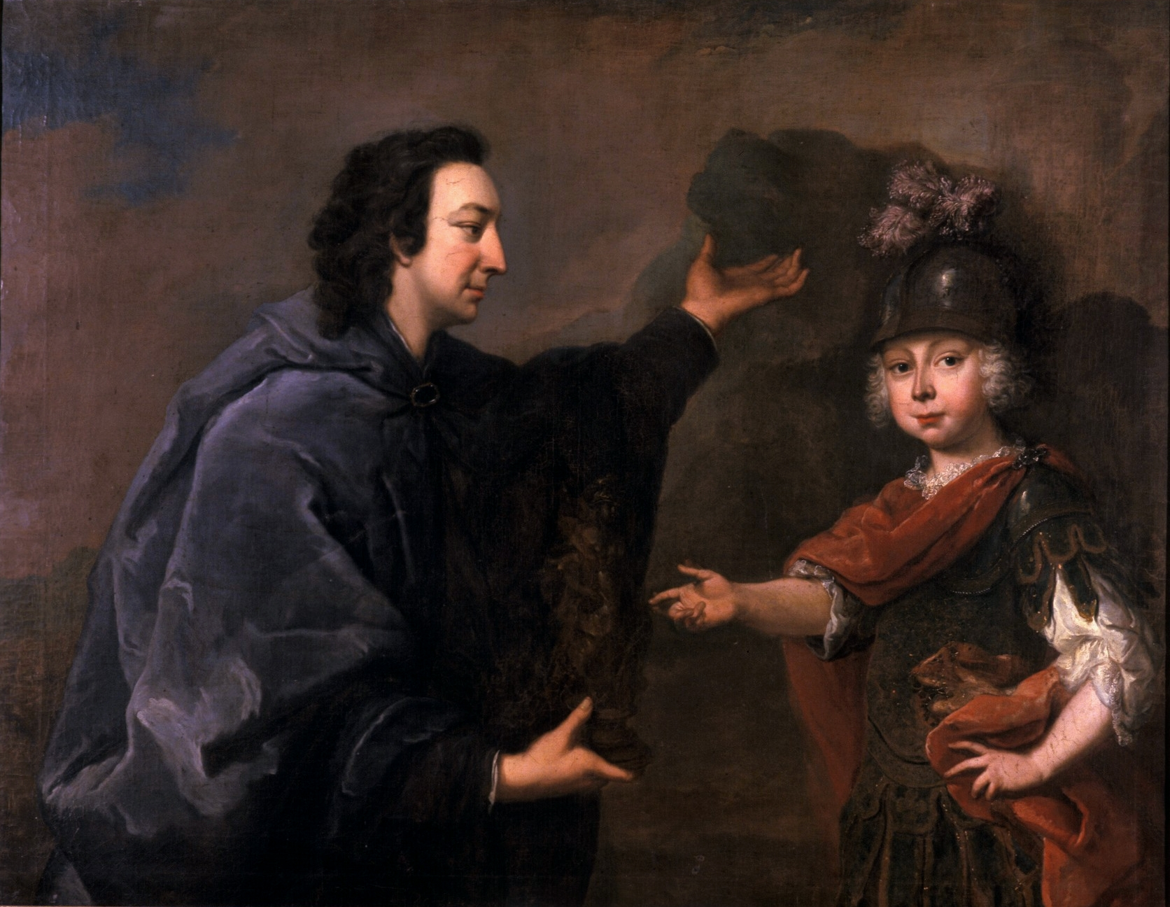 Rechts im Bild der Erbprinz als Knabe, links sein Erzieher Graf Ulrich von Thun